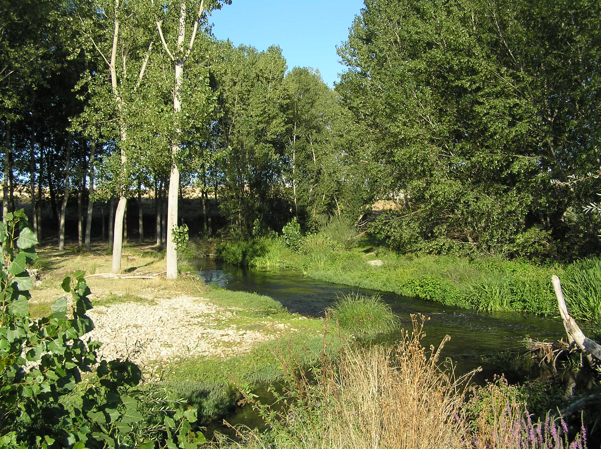 Río Eresma a su paso por el paraje de Los Redondillos (Los Huertos, Segovia)